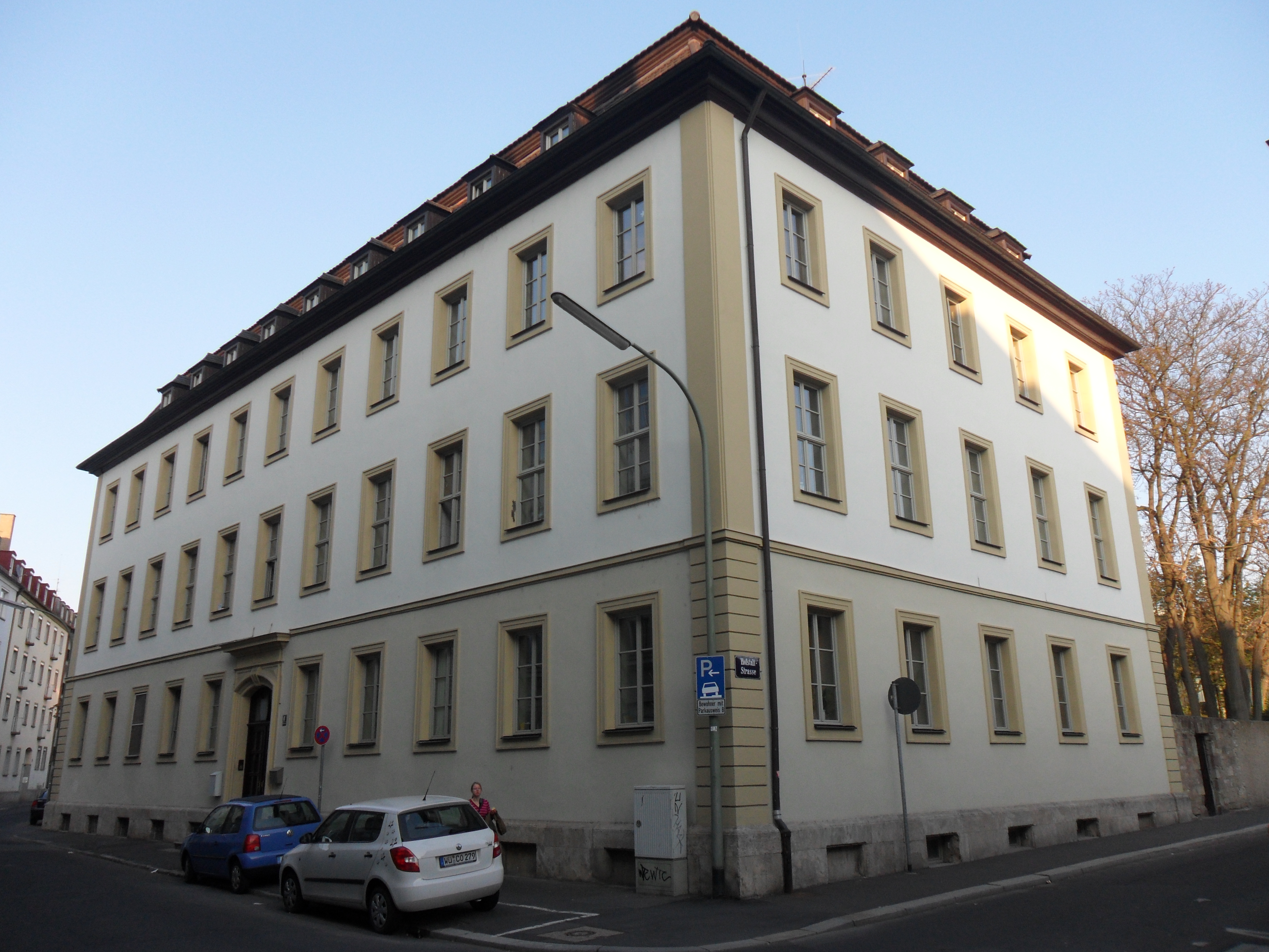 Siehe Bildtitel